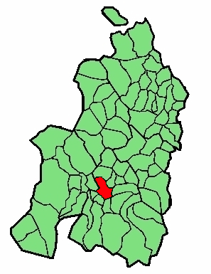 aipaturiko udalerriaren kokapena Nafarroa Beherean